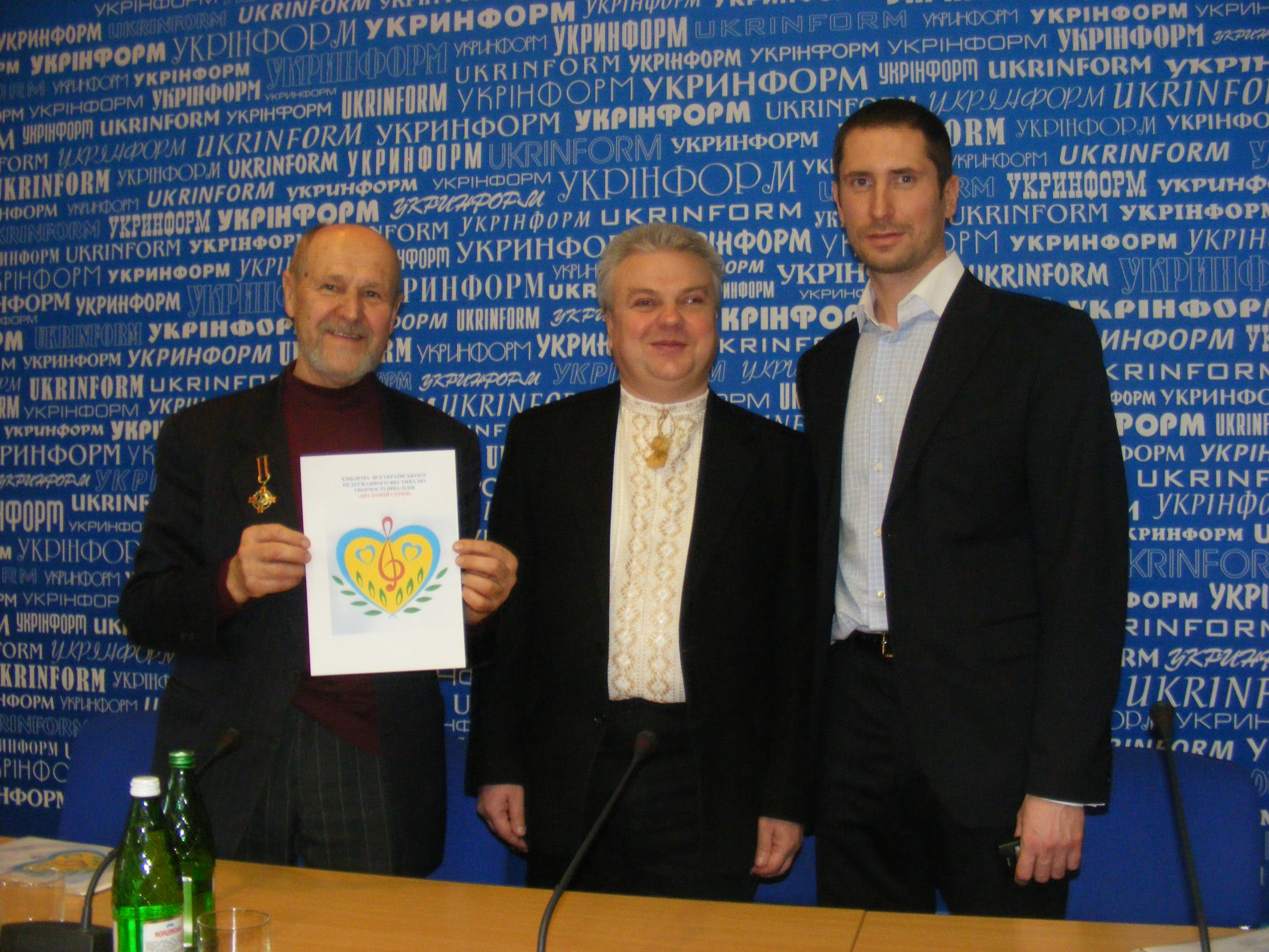 02 березня 2010 року в приміщенні Національного інформаційного агентства "Укрінформ" було презентовано концепцію і емблему Першого Всеукраїнського (недержавного) фестивалю творчості інвалідів "Неспокій серця", автором ідеї, концепції діяльності та незмінним співголовою журі якого є В.Б. Петровський